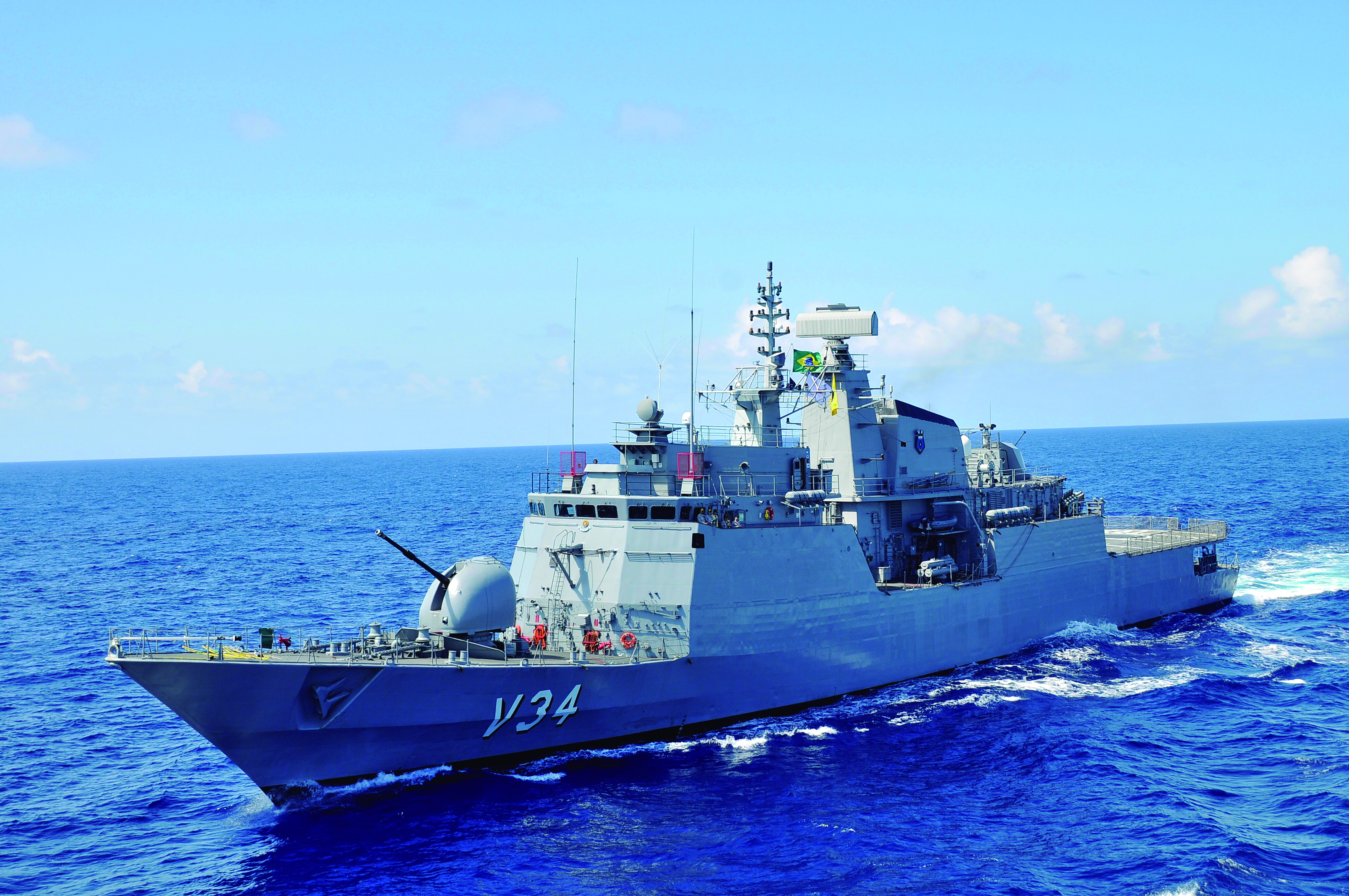 Arquivo liberado pela Marinha do Brasil através de projeto GLAM com Wiki Educação Brasil